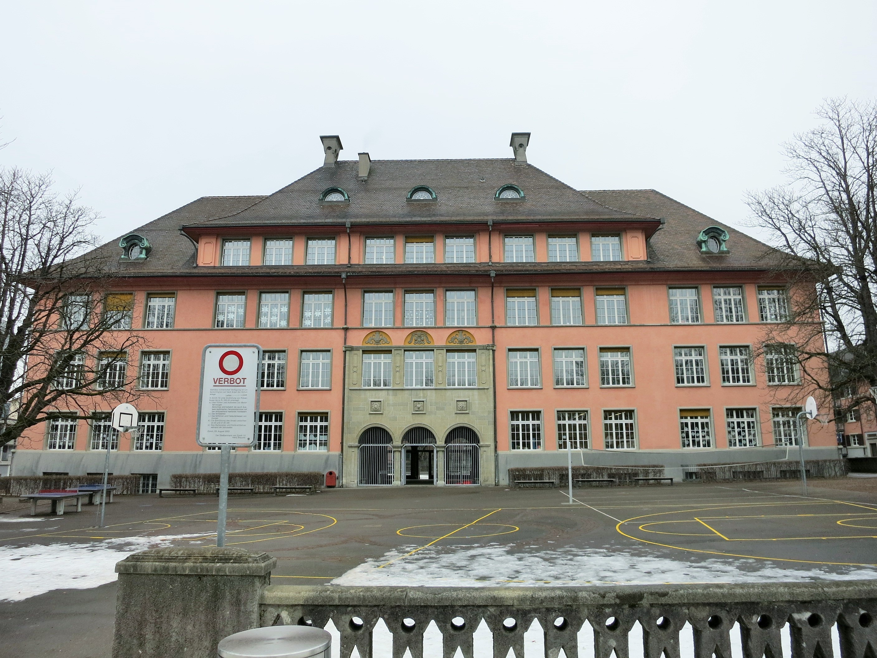 Schulhaus Letten, Zürich, Schweiz